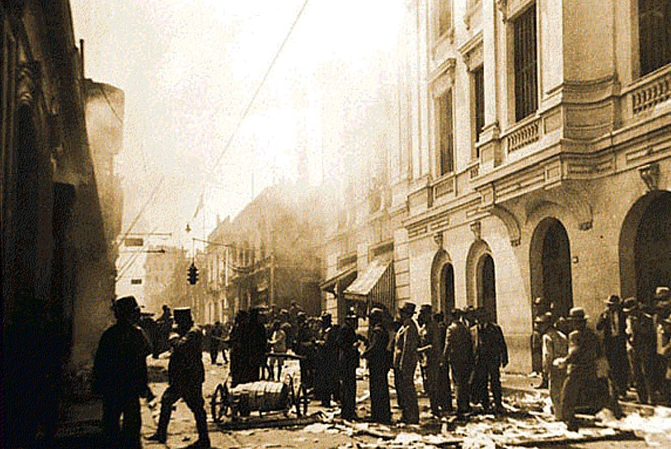 Saqueo de la casa del presidente peruano Augusto B. Leguía, luego de su destitución. Lima, 1930.